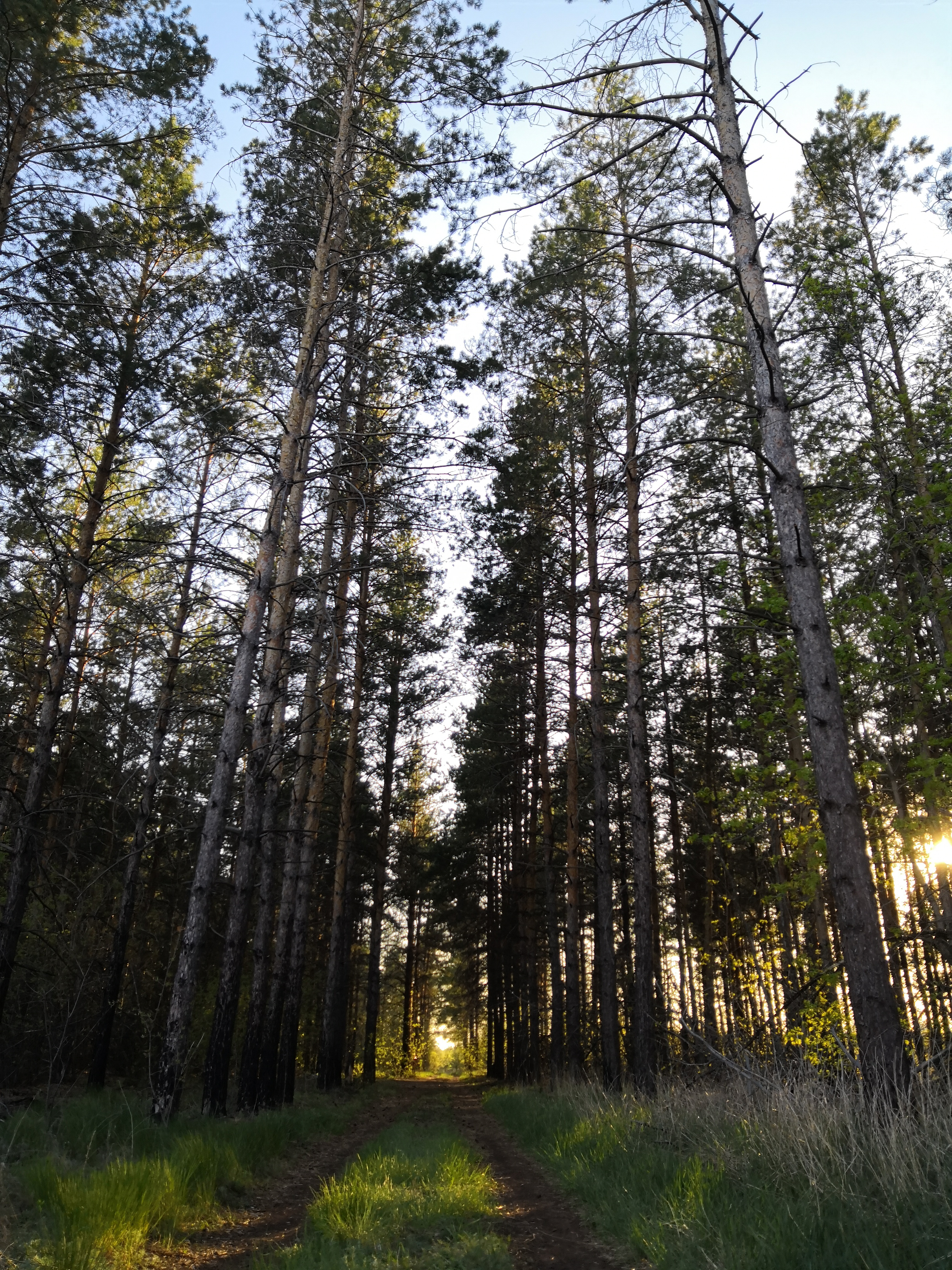 сосновый лес Качкарка